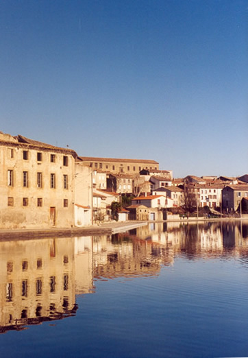 Estanque del Canal du Midi en Castelnaudary